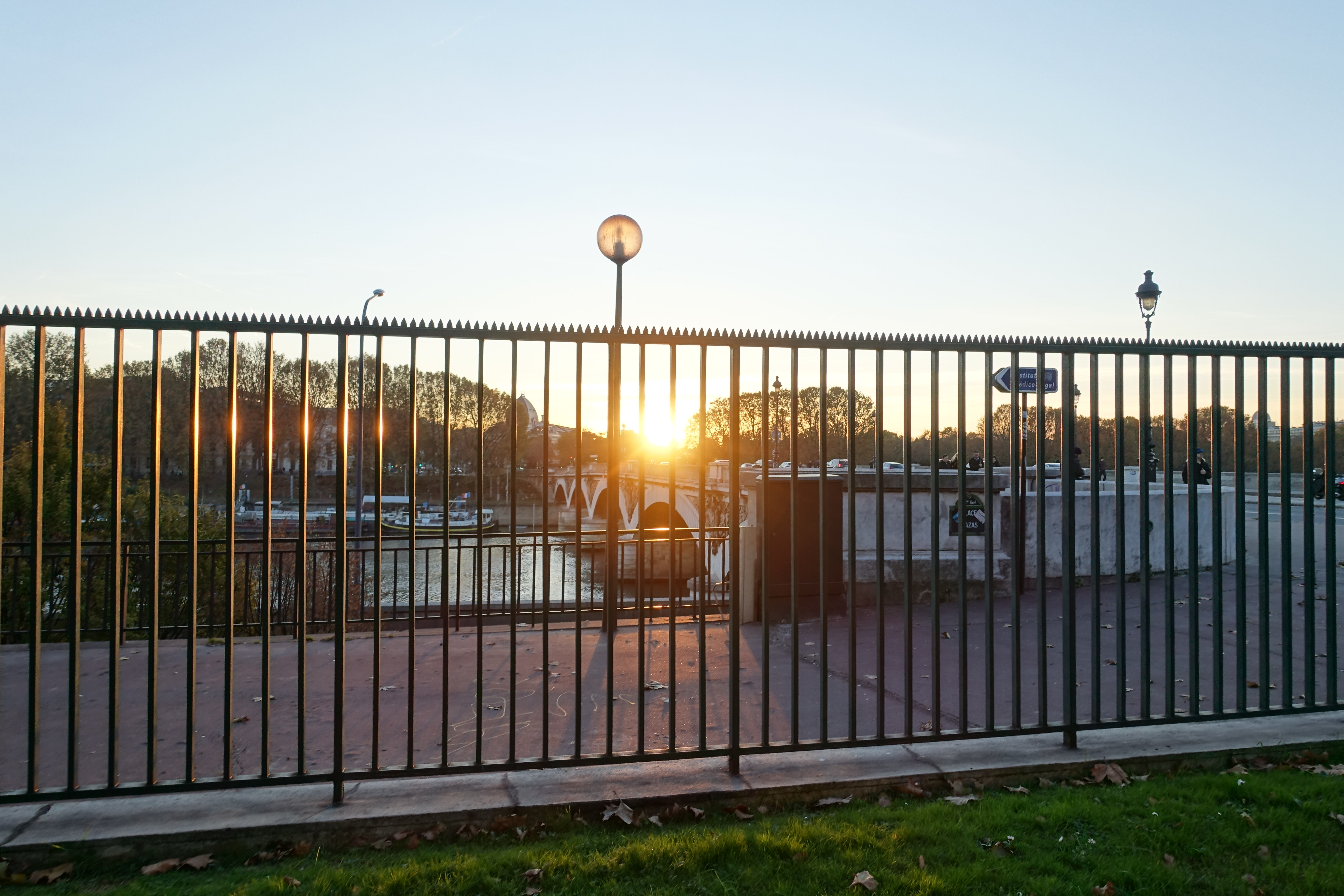 Sunset @ Square Albert Tournaire @ Paris